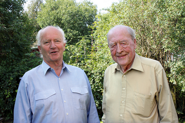 Thorvald Stoltenberg og Odvar Nordli